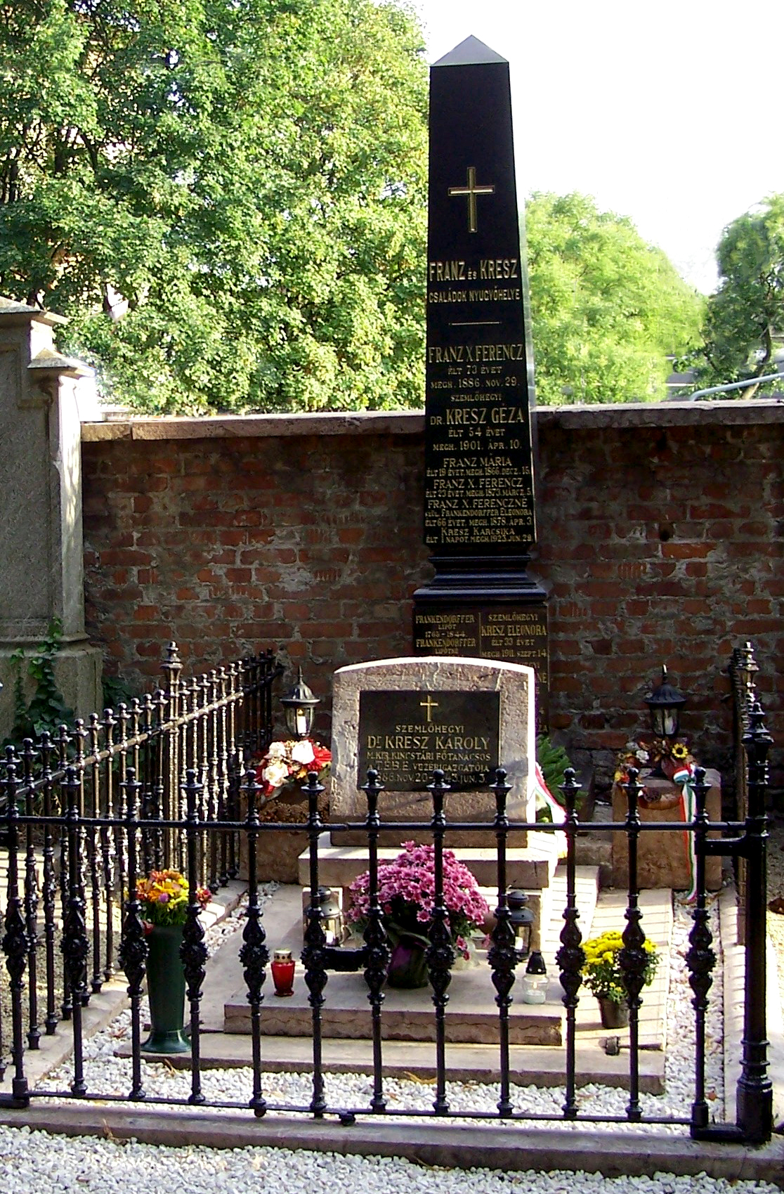 Kresz Géza sírja Budapesten, a Fiumei úti Nemzeti Sírkertben (J. 212.)